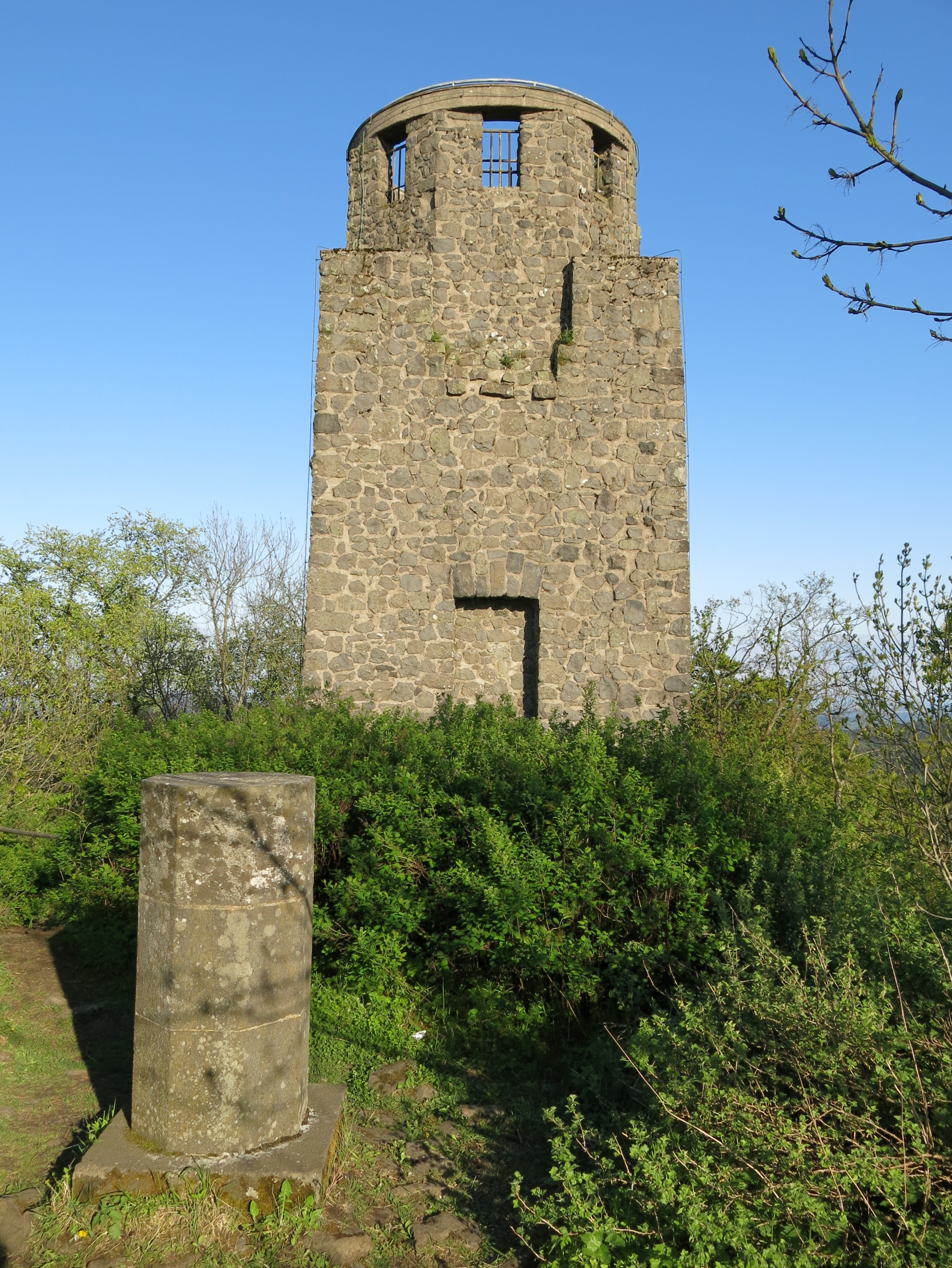 Der Kaiser-Wilhelm-Turm auf der Hohen Acht in der Eifel von Westen.